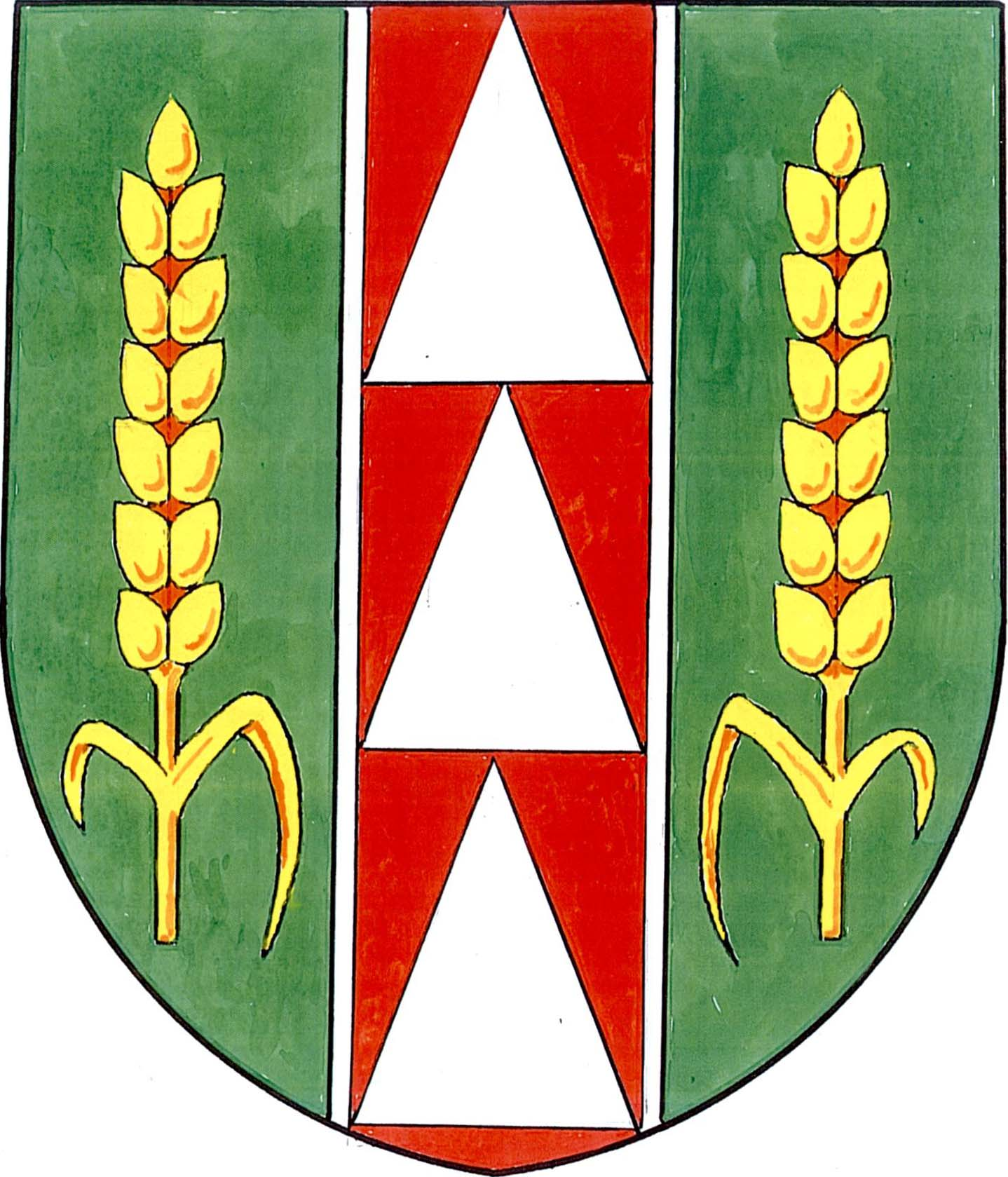 Česky: znak obce Svésedlice